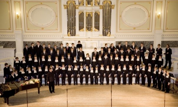 Хор мальчиков Санкт -Петербурга под руководством Вадима Пчёлкина